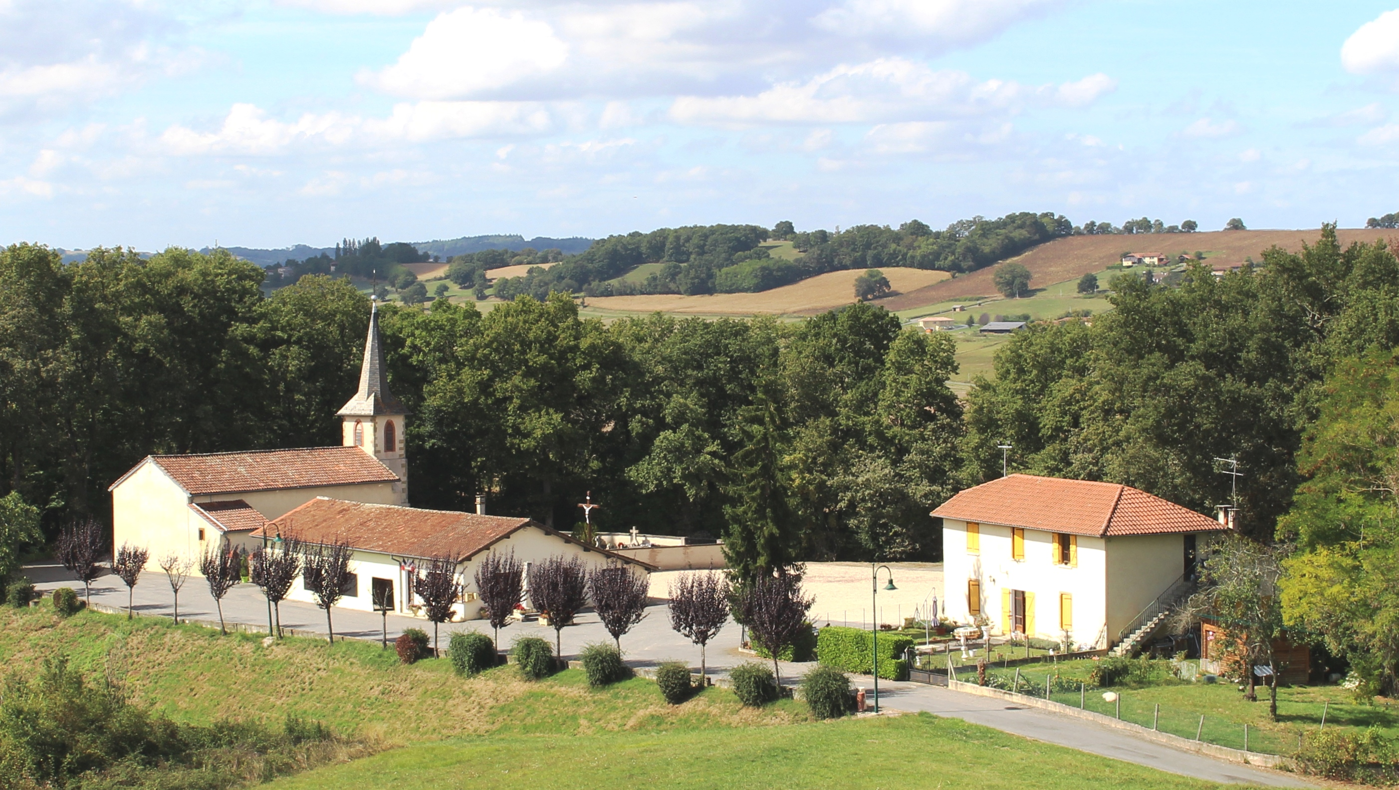 Villemur (Hautes-Pyrénées)